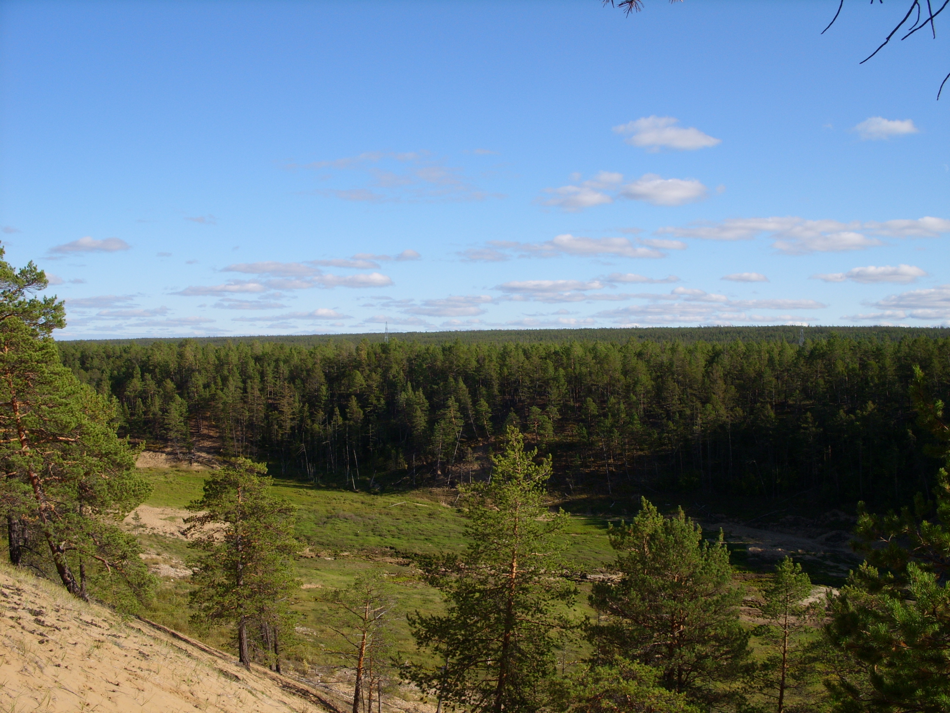 Источник "Булуус", Хангаласский улус, Якутия